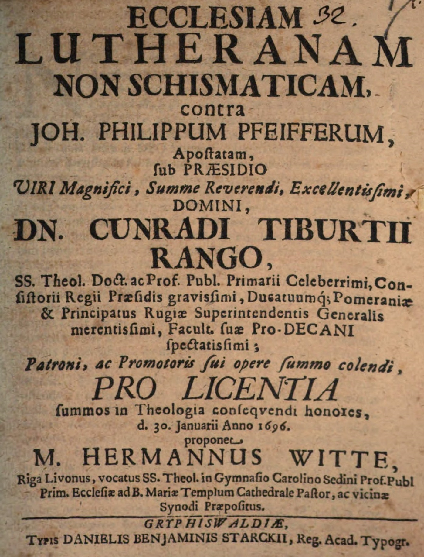 Herman Witte: Ecclesiam Lutheranam non schismaticam, contra Joh. Philippum Pfeifferum, Apostatam. Doktorthesen, betreut von Konrad Tiburtius Rango, Greifswald 1696